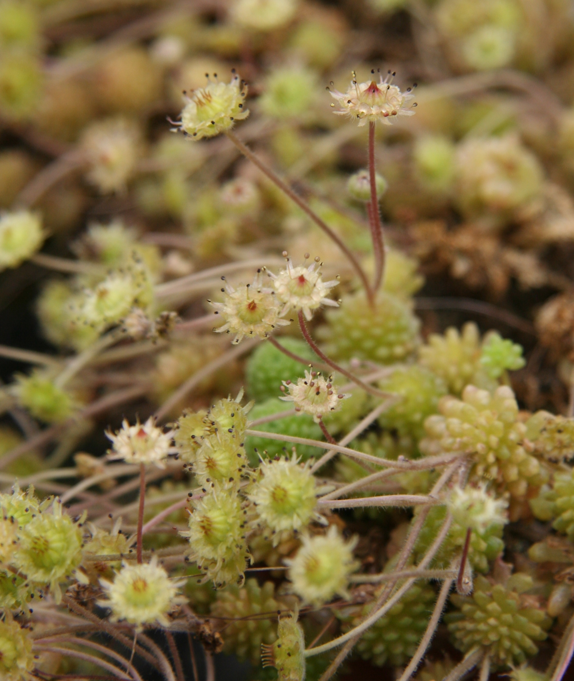 Monanthes polyphylla in Blüte in der Gärtnerei Flores-Reinecke, Leverkusen